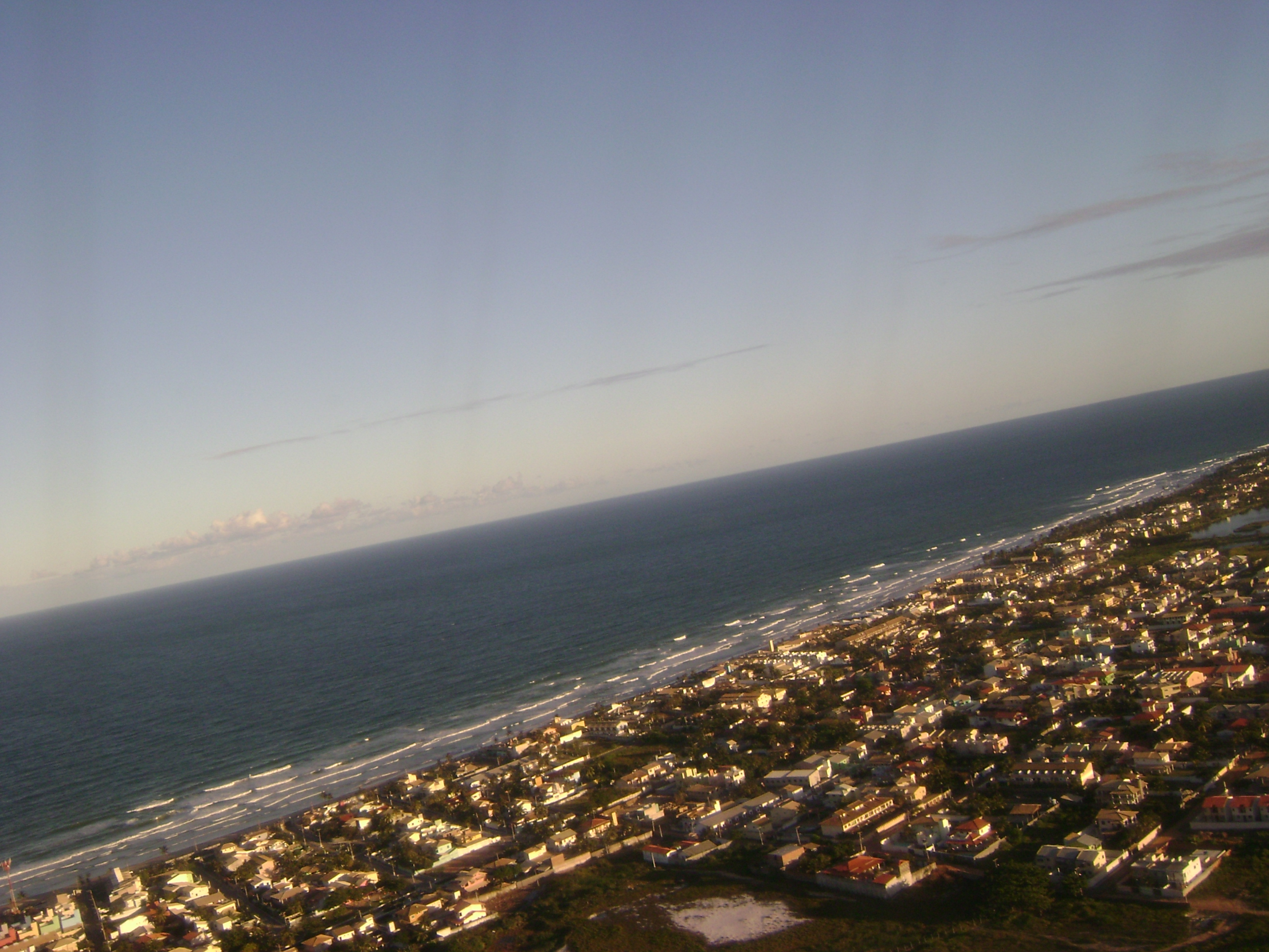 Vista da cidade de Lauro de Freitas (limite com Salvador) da janela de um avião durante um voo entre Salvador (Bahia) e Belo Horizonte (Minas Gerais), no Brasil.